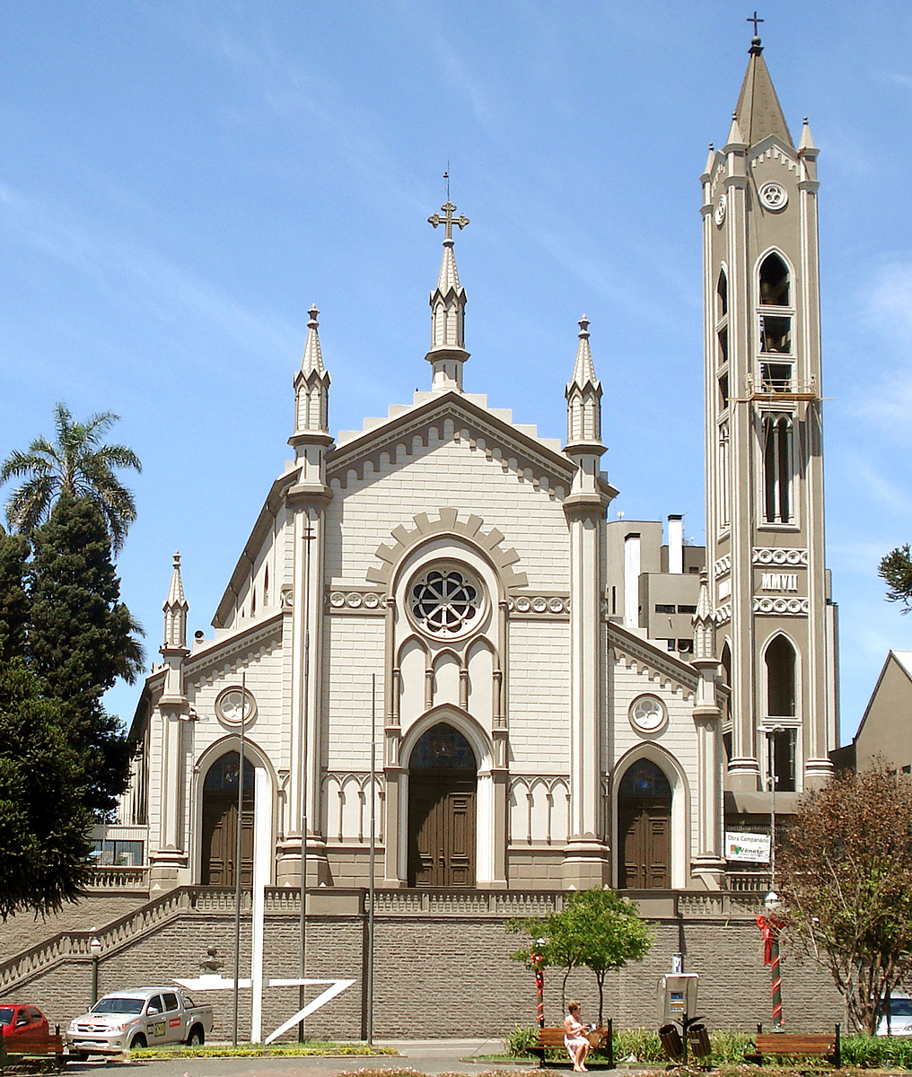 Catedral de Caxias do Sul com o novo campanário inaugurado em outubro de 2007.